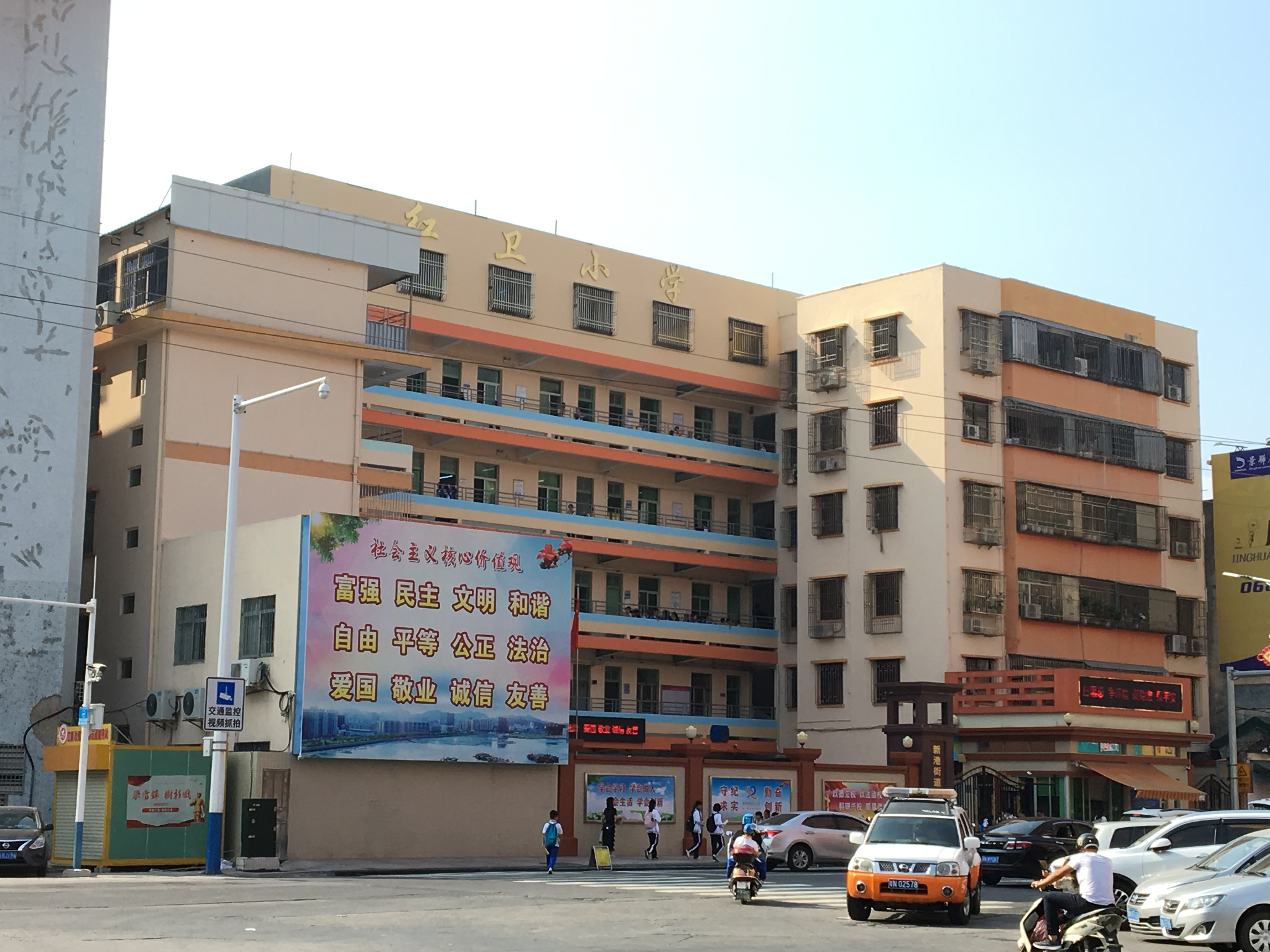 汕尾市紅衛小學